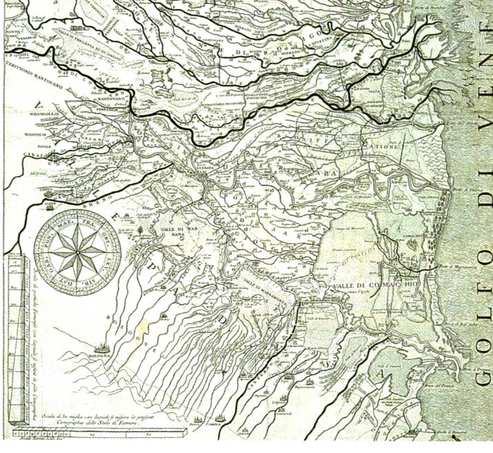 photo d'une Carte de 1603